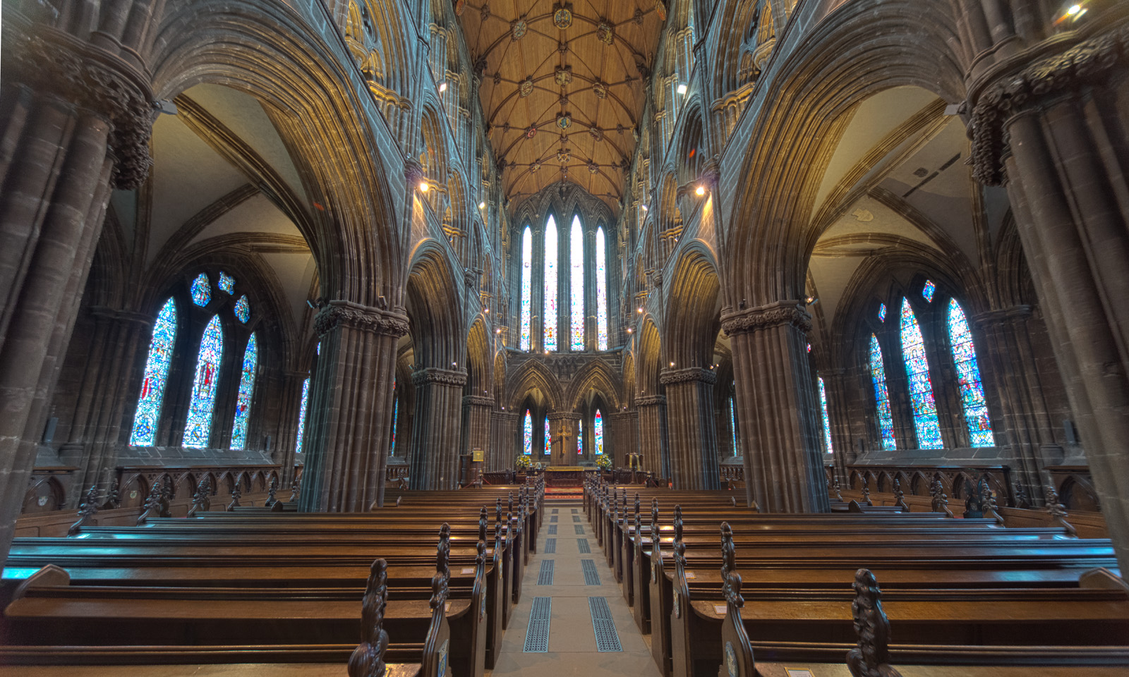 Glasgow Cathedral (HDR)